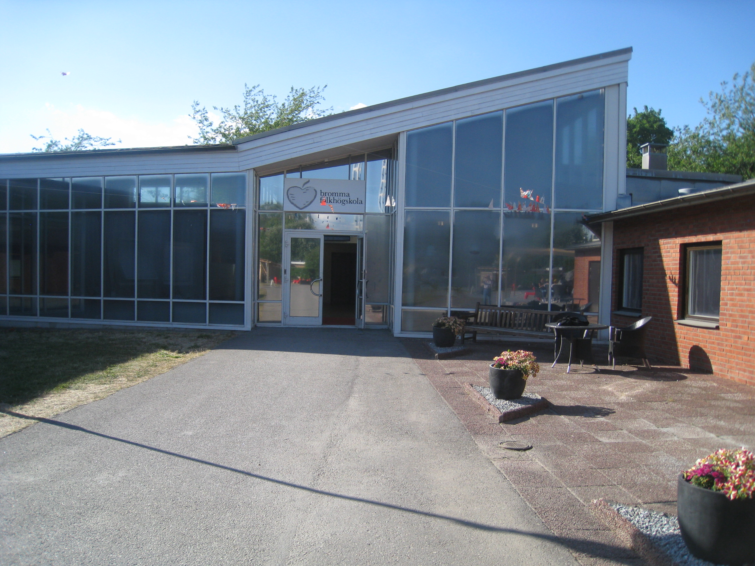 Bromma folkhögskola, Campus Bromma, huvudentré, Åkeshovsvägen 29, Nockebyhov, Bromma, Stockholm.